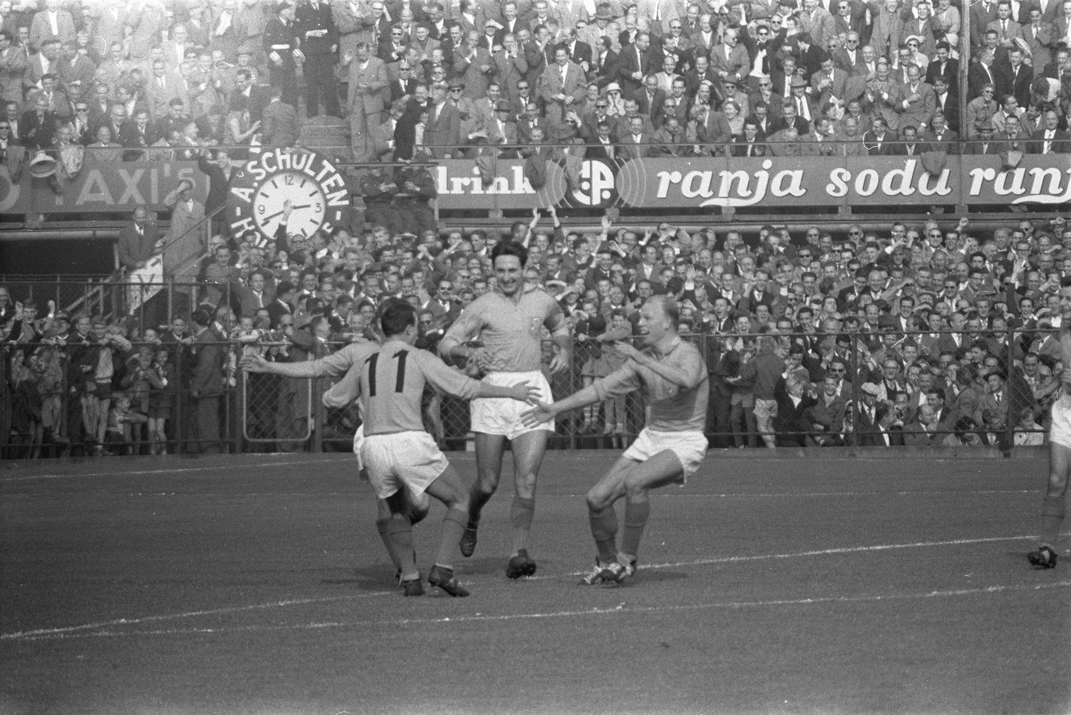 Collectie / Archief : Fotocollectie Anefo Reportage / Serie : [ onbekend ] Beschrijving : Nederland tegen Belgie 9-1, Wilkes (midden) heeft gescoord Annotatie : Rechts Roel Wiersma, op de rug gezien Coen Moulijn (11) Datum : 4 oktober 1959 Locatie : Rotterdam, Zuid-Holland Trefwoorden : sport, voetbal Persoonsnaam : Wilkes, Faas Fotograaf : Pot, Harry / Anefo Auteursrechthebbende : Nationaal Archief Materiaalsoort : Negatief (zwart/wit) Nummer archiefinventaris : bekijk toegang 2.24.01.05 Bestanddeelnummer : 910-7229